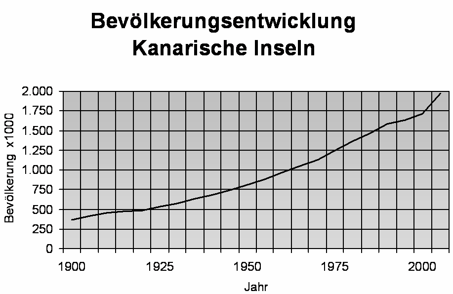 Diagramm Bevölkerungsentwicklung Kanarische Inseln